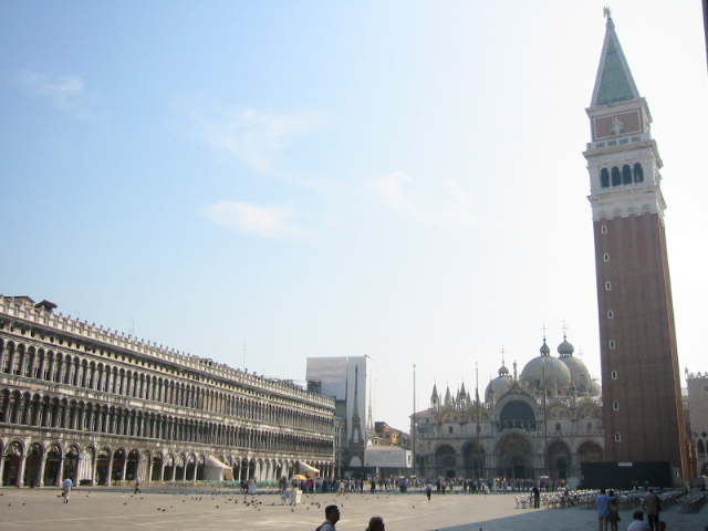 Basilica de Saint Marc sur la place Saint Marc vu depuis le Café Florian de Venise